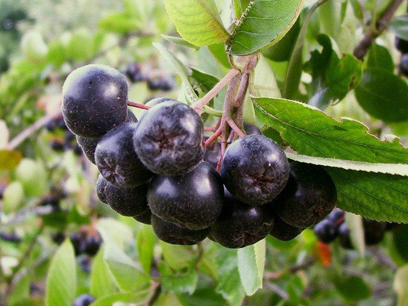 Name Aronia melanocarpa Subfamily Maloideae Family Rosaceae Fruit